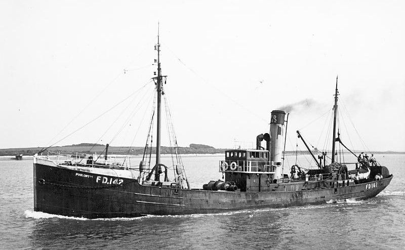 Le Phrontis (FD 142) de la Royal Navy section belge, ex HMS Phrontis.